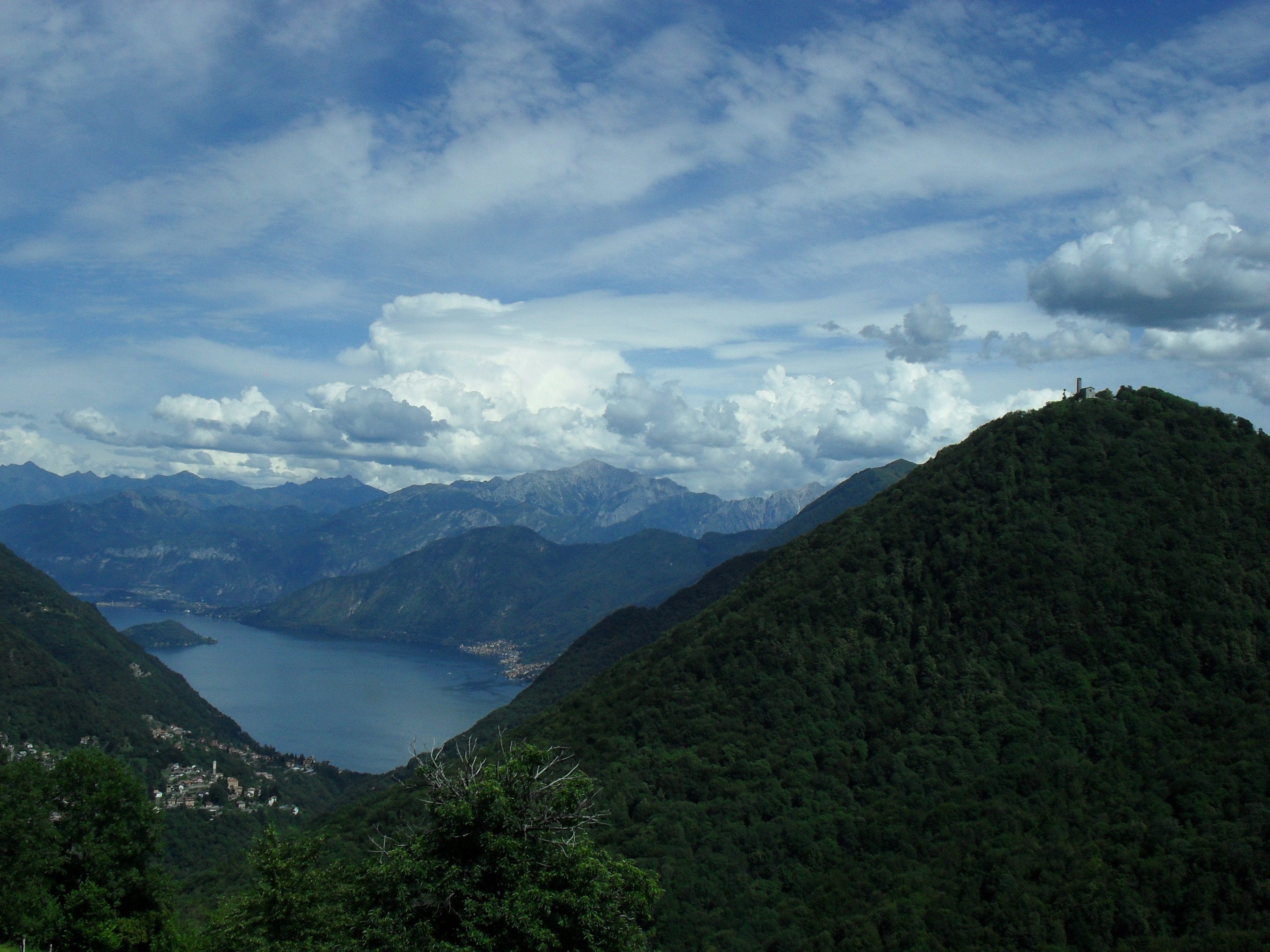 scorcio di Val d'Intelvi e Lario